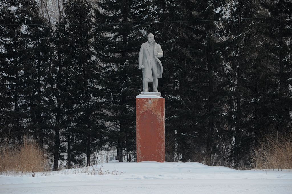 Ленин в с. Советское, Алтайский край